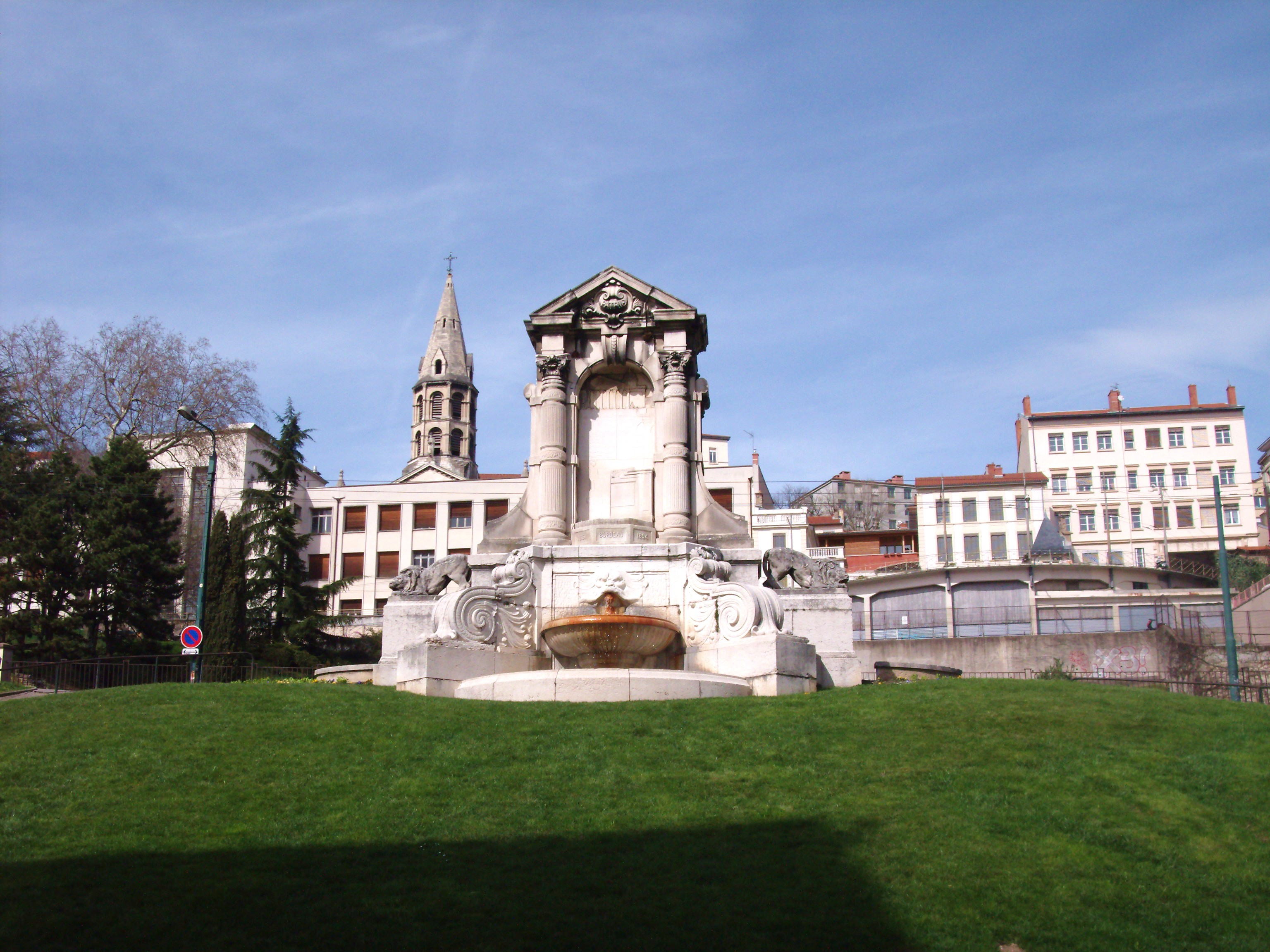 La fontaine de la Burdeau se trouve sur la colline de la Croix-Rousse